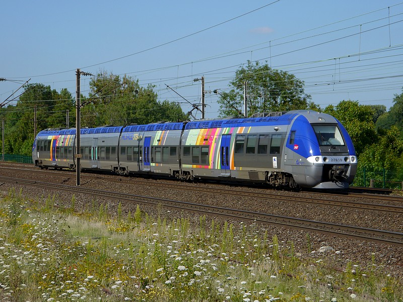 ZGC en livrée Alsace sur une course TER Lorraine Metz - Nancy. Notez la caisse supplémentaire rajoutée, encore dépourvue de livrée.